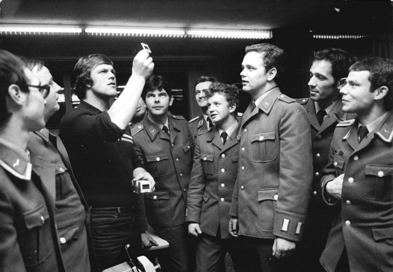 Neubrandenburg, Rüdiger Helm bei NVA-Luftwaffe ADN-ZB Bartocha 11.2.80 Abgeordneter-Neubrandenburg: Viele Fragen hatte der Bezirkstagsabgeordnete Rüdiger Helm, Olympiasieger und mehrfacher Weltmeister im Kanurennsport, bei seinem Besuch im NVA-Truppenteil Adler zu beantworten.